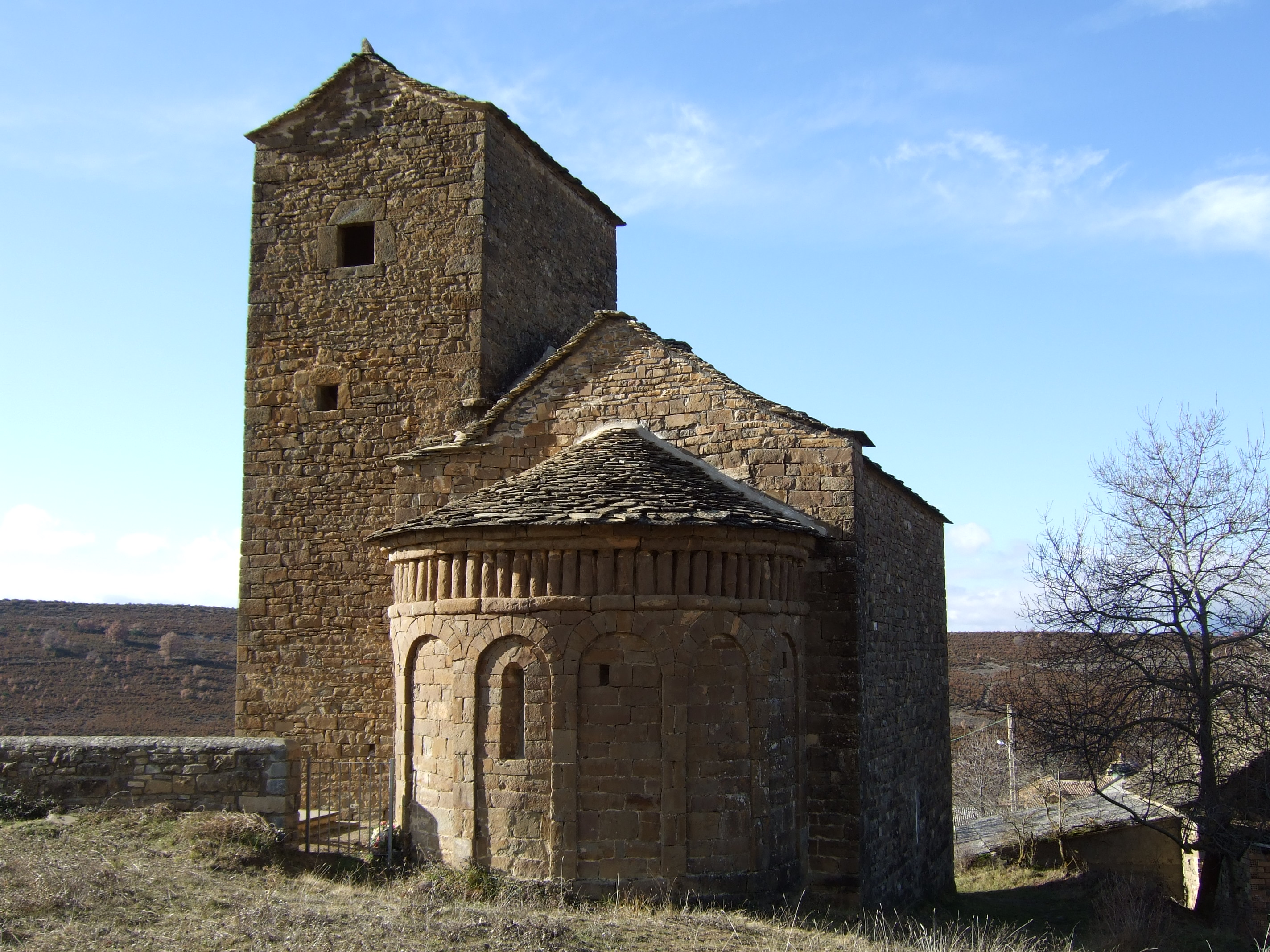 Satué - Iglesia de San Andrés, siglo XI